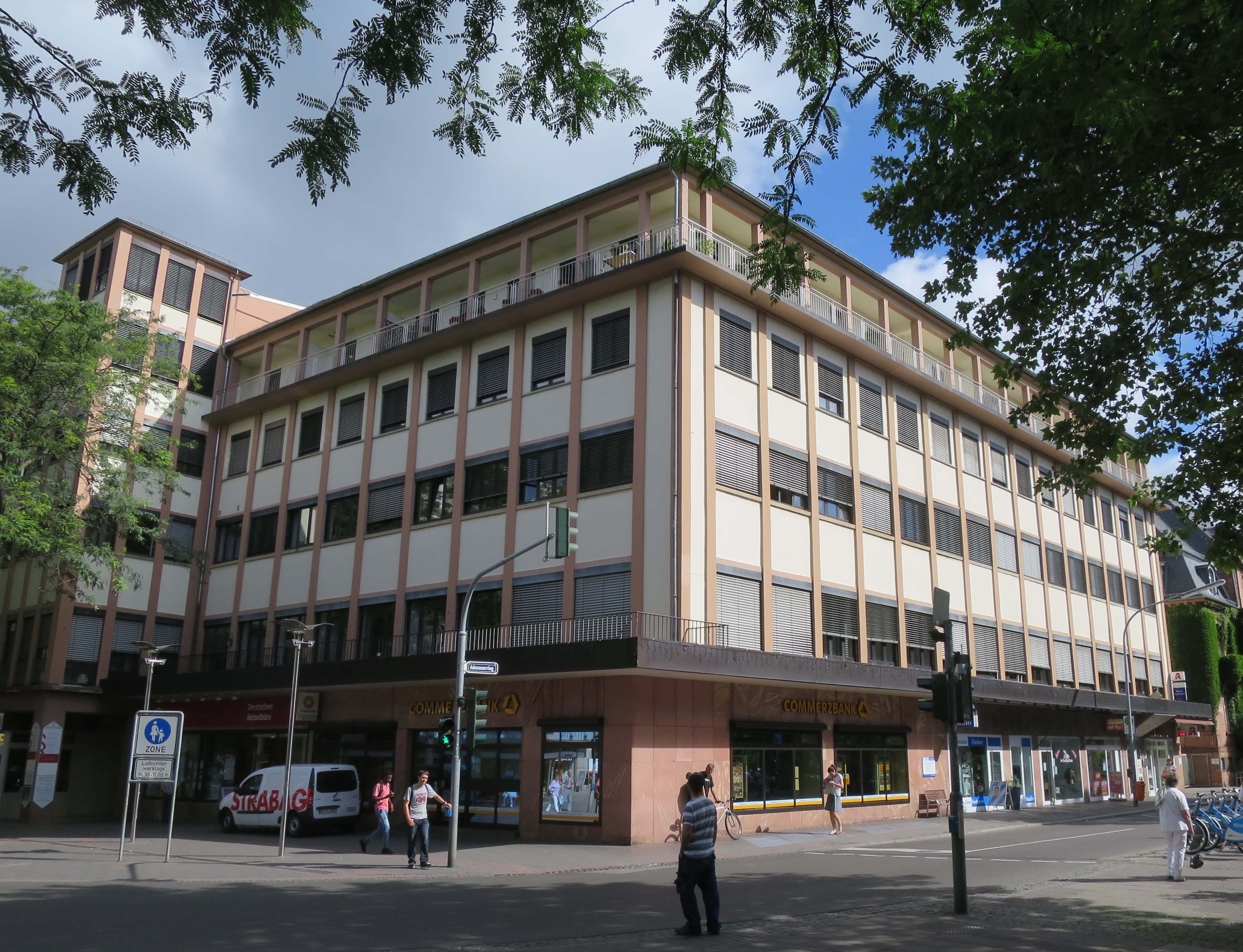 Worms, Wilhelm-Leuschner-Straße 2